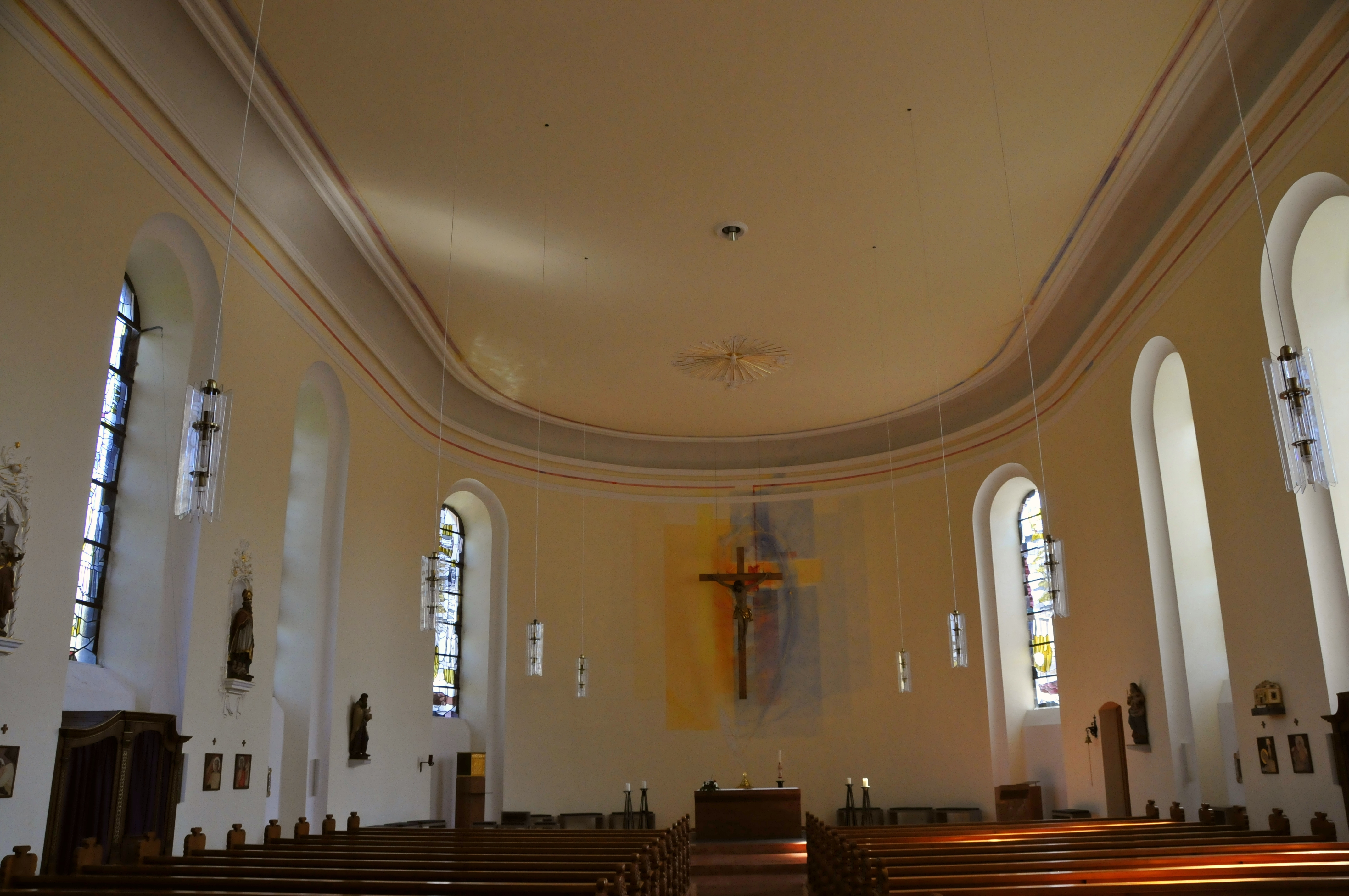 Neumagen, Kirche St. Maria Himmelfahrt